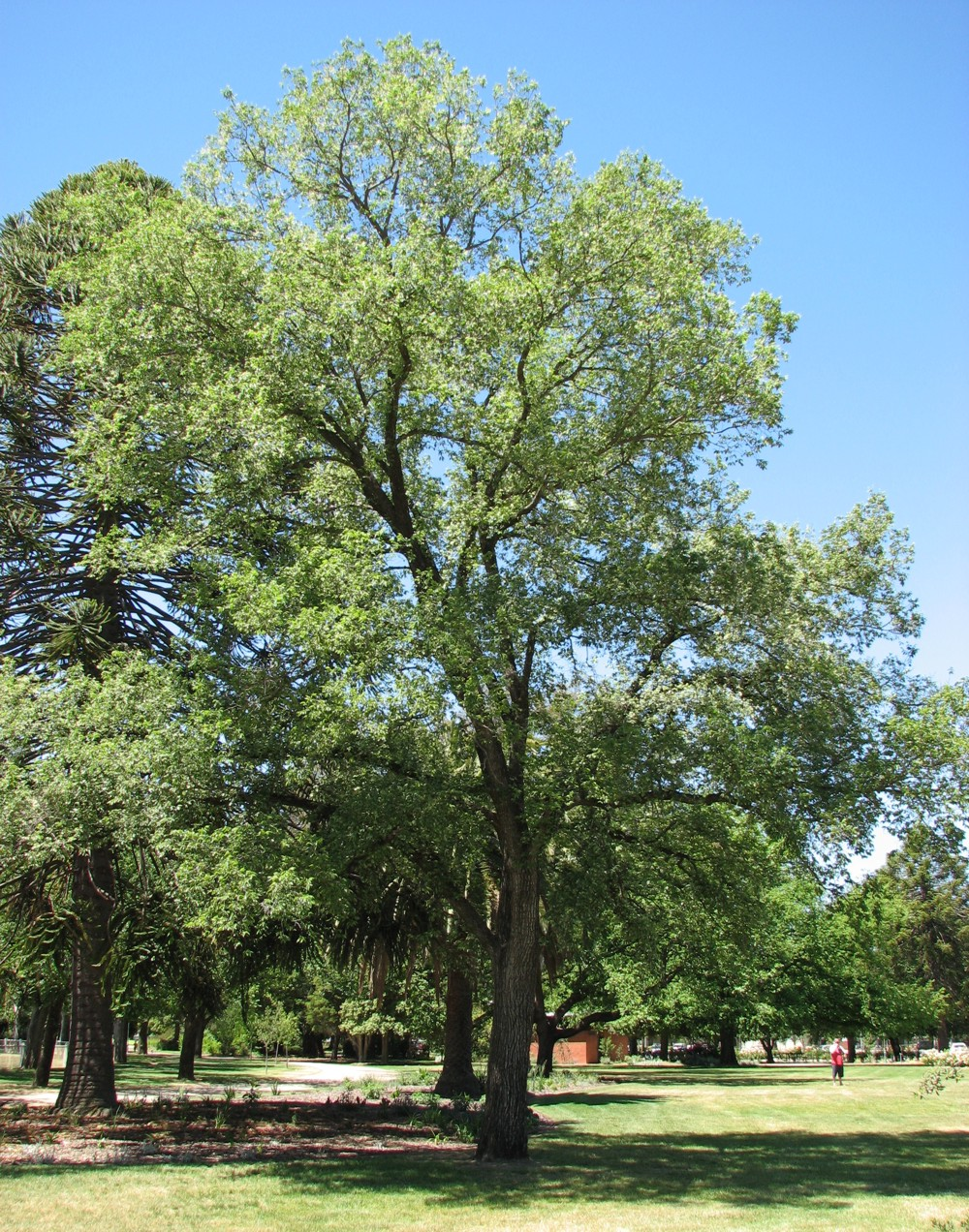 Ulmus minor 'Variegata', Benalla Botanic Gardens, Victoria, Australia